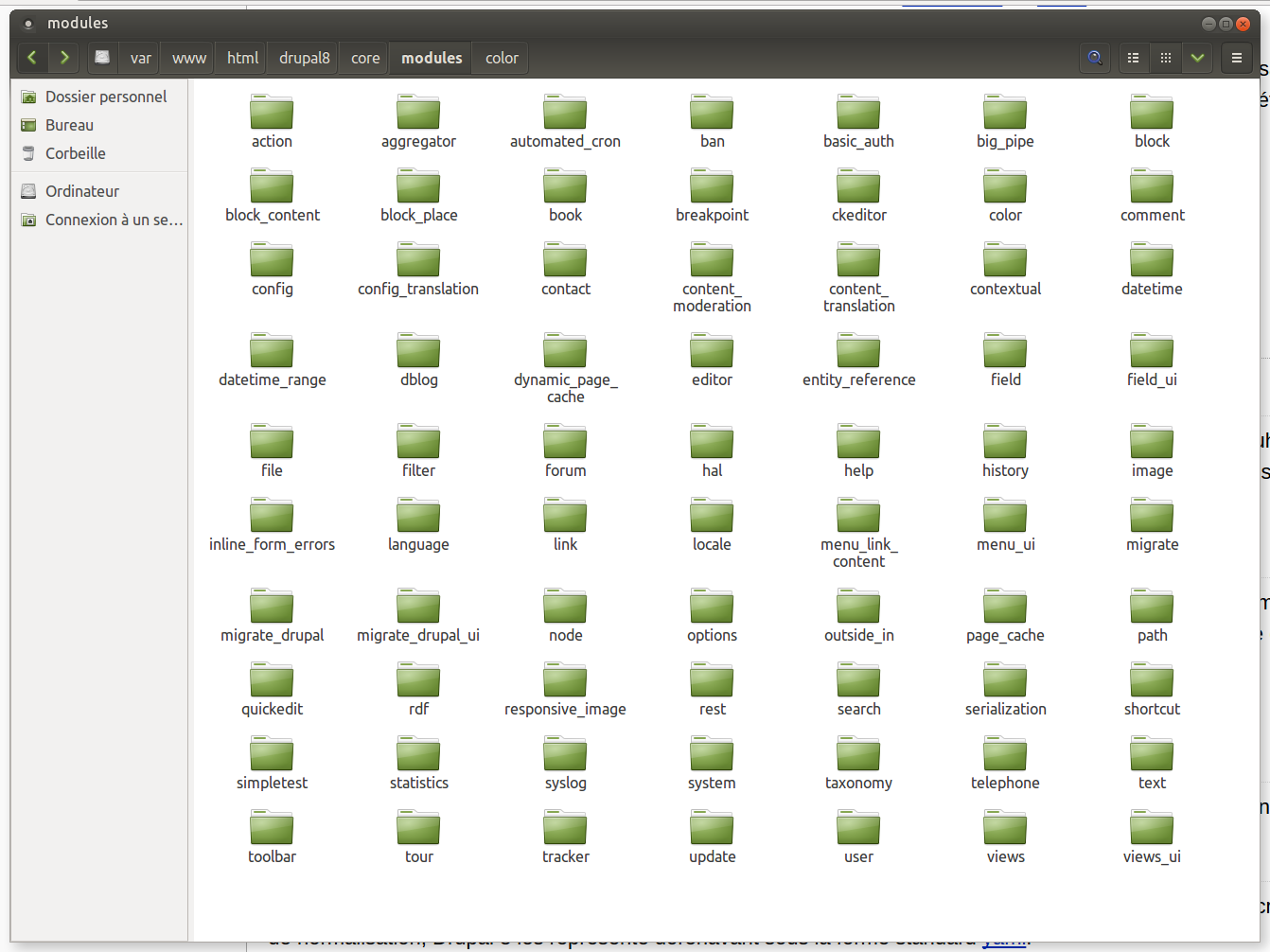 Les modules du coeur (core) de Drupal 8